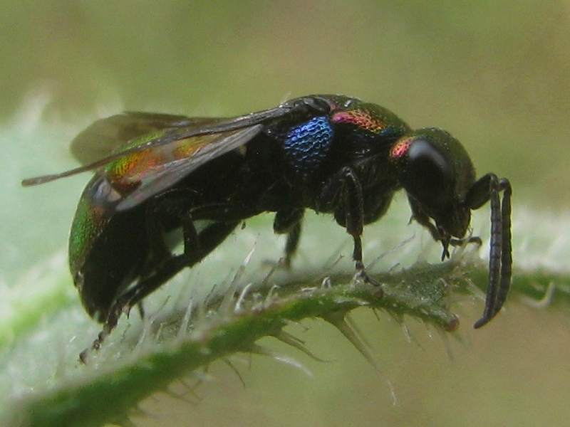 Holopyga fervida, location: France - Poitou-Charentes